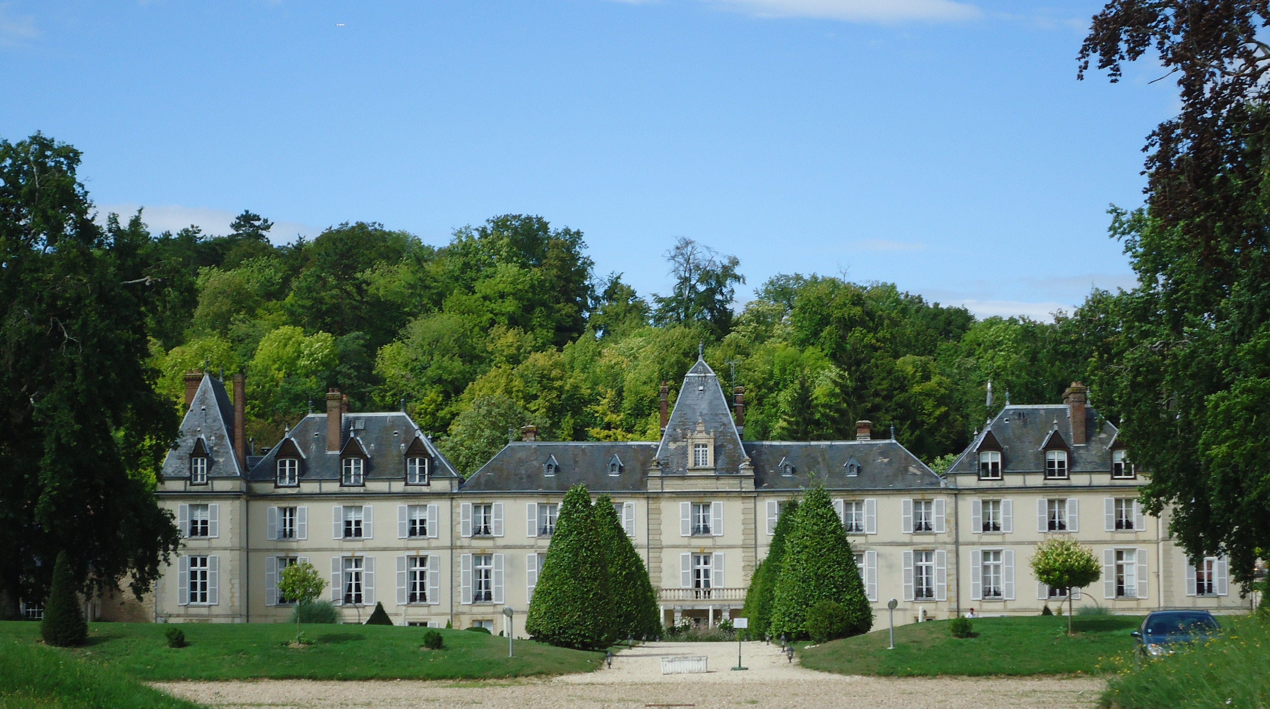 Château d'Aveny - Dampsmesnil - Eure (27)